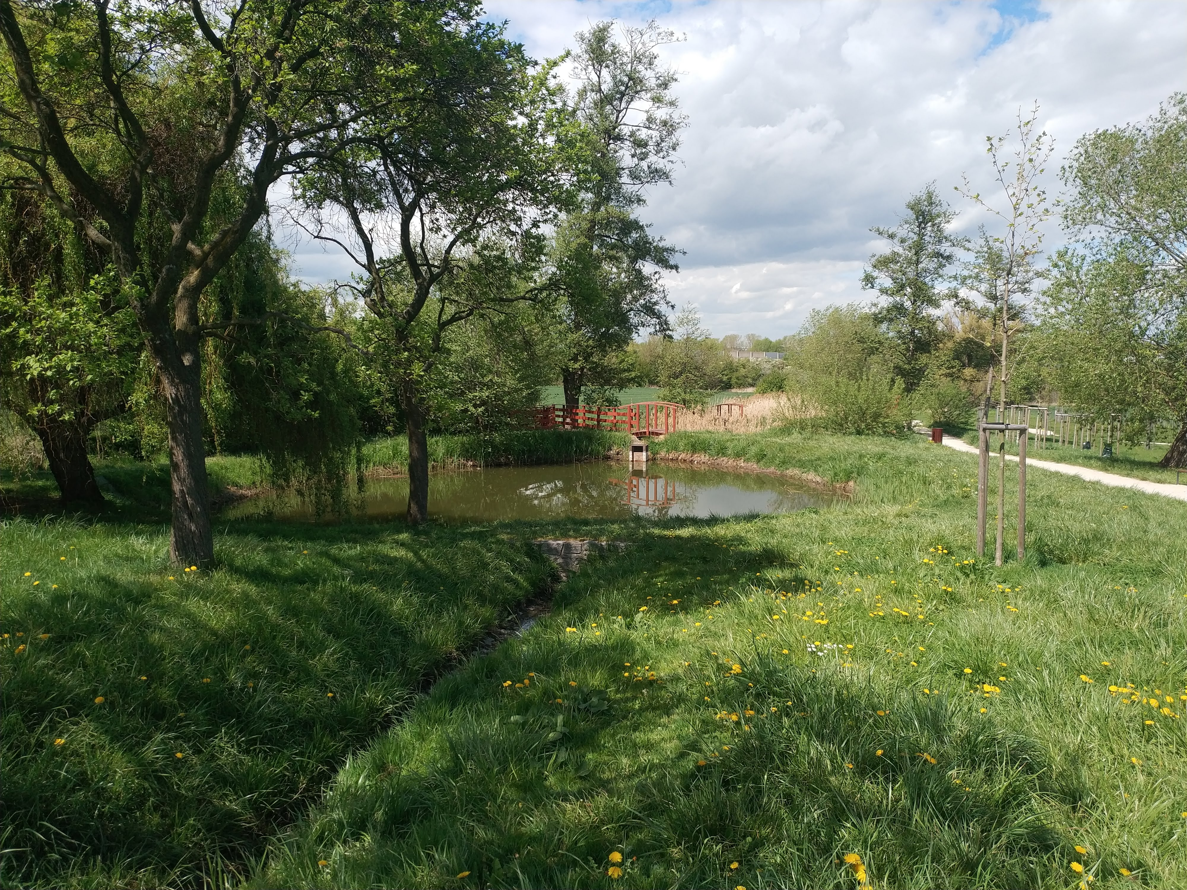 Rybník v ulici Mistřínská v Praze na Zličíně.